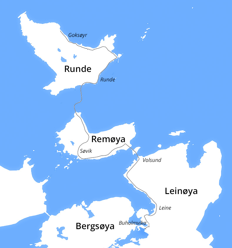 Oversiktskart over Fylkesvei 18 i Herøy kommune, Møre og Romsdal